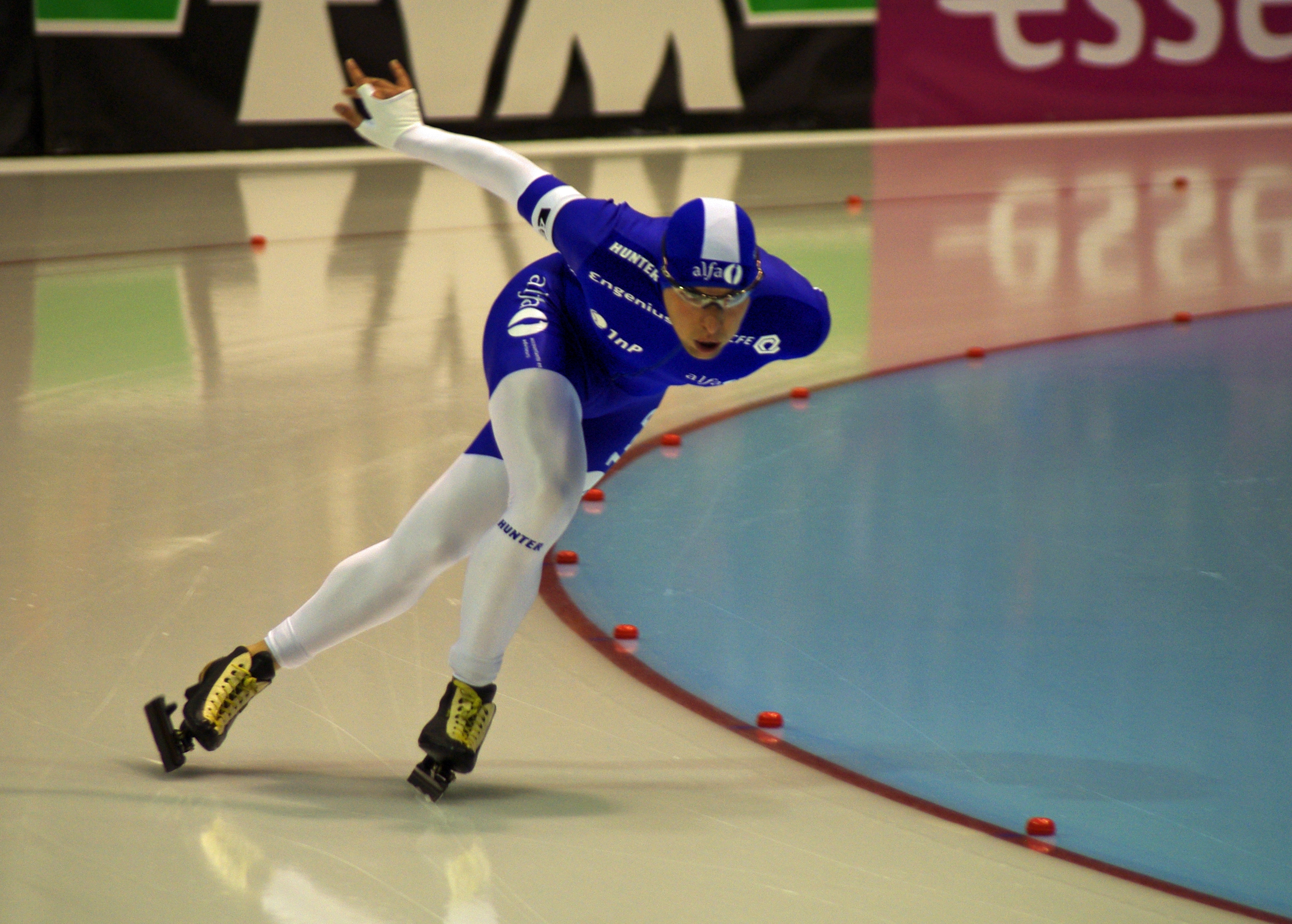 Arjen van der Kieft (Zwanenburg, 17 mei 1985) is een Nederlandse langebaanschaatser. Hij is gespecialiseerd in de lange afstanden. Van der Kieft wordt getraind door oud-schaatser Gianni Romme en gesponsord door Alfa Accountants en Adviseurs en 1nP. In 2002 won hij de Egbert van 't Oever Aanmoedigingsprijs. -- Arjen van Der Kieft tijdens het AKT in Thialf Heerenveen